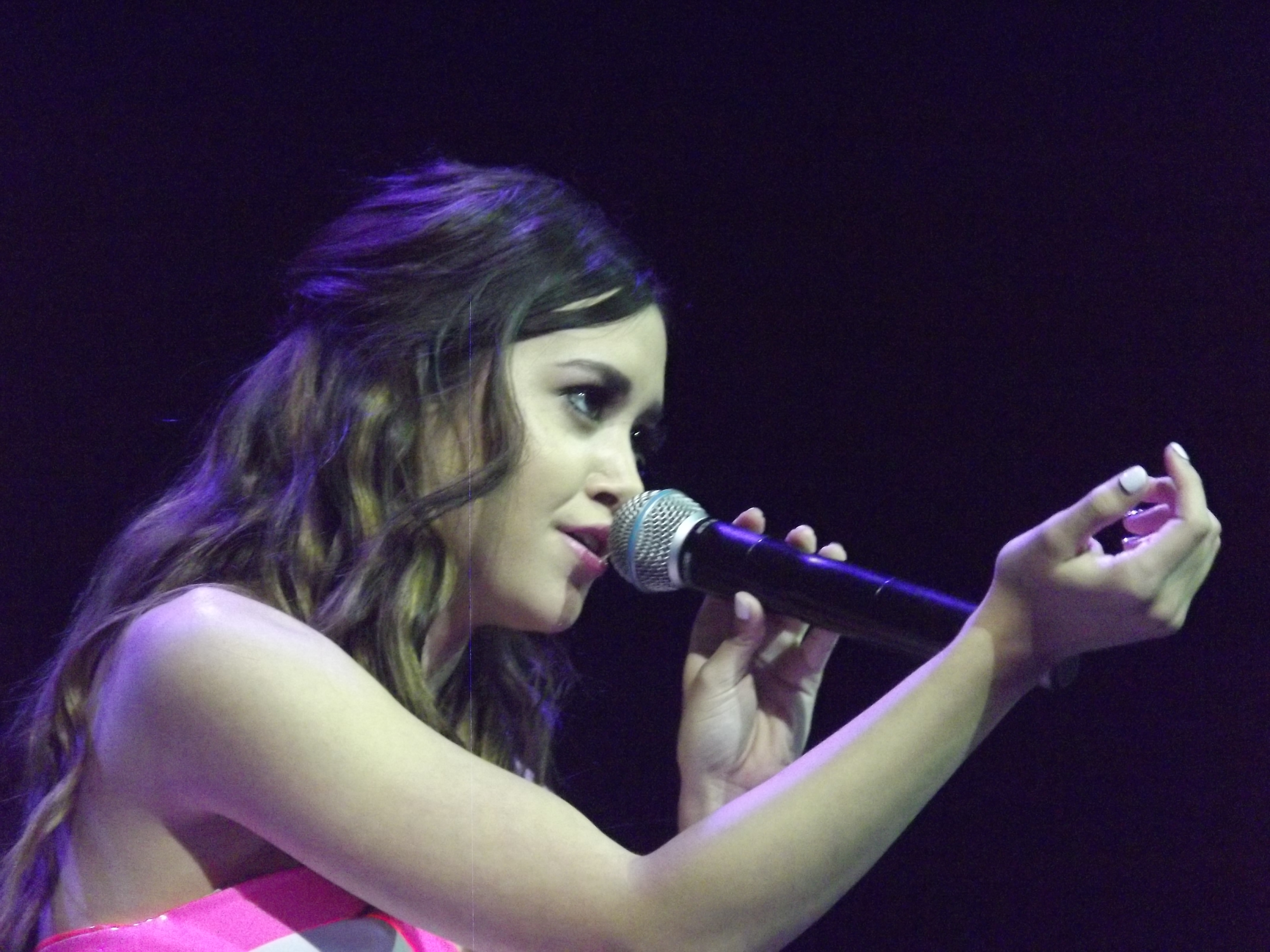 Megan Nicoles Auftritt bei den Videodays 2014